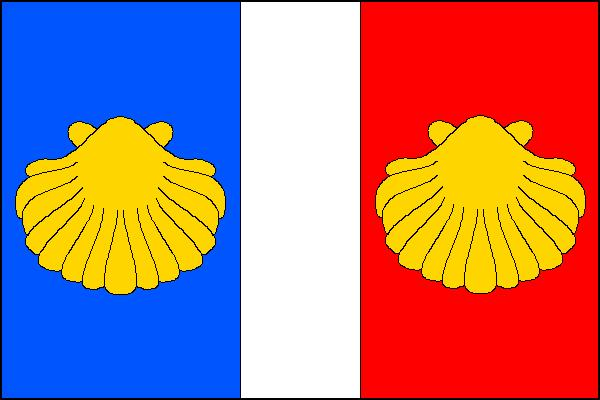 Vlajka obce Sviadnov